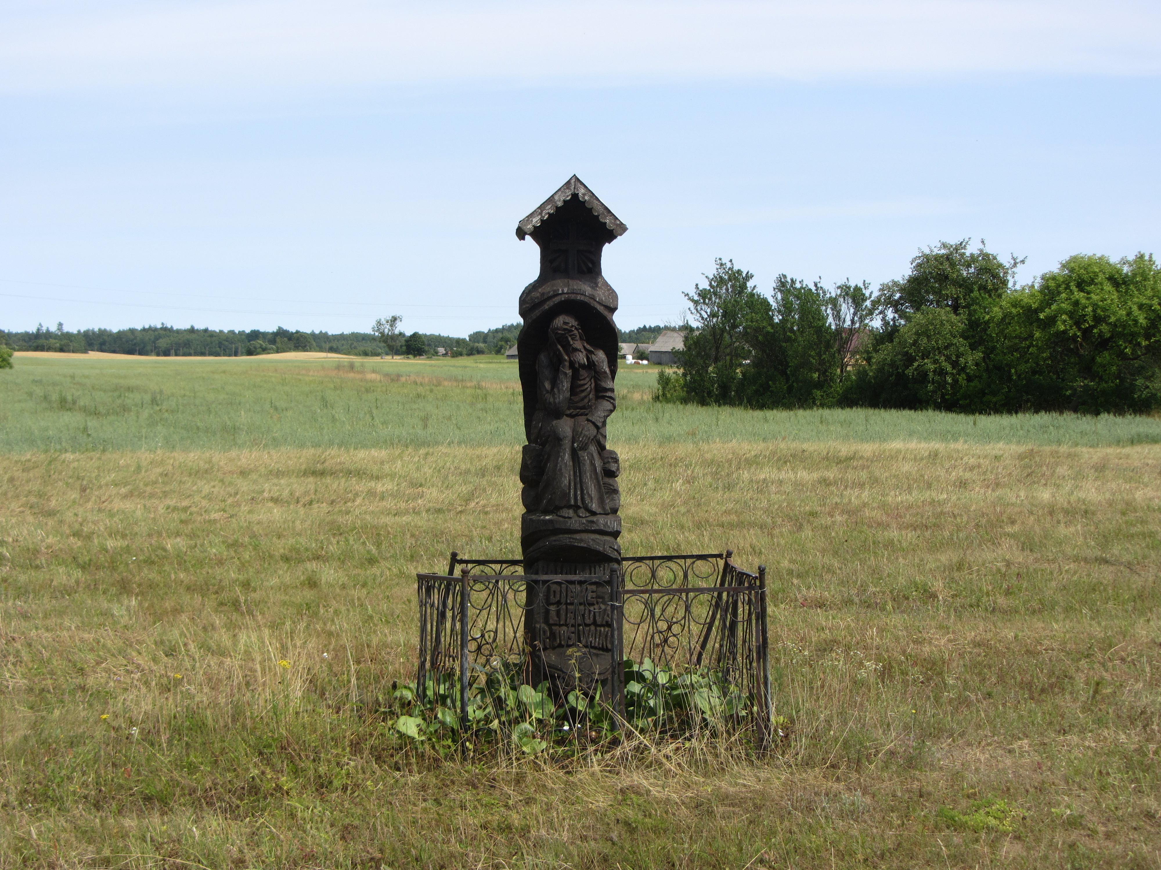 Ricieliai, Lithuania